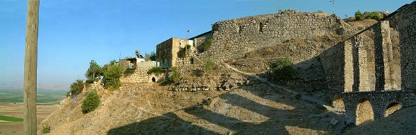 Le château de Trapesac